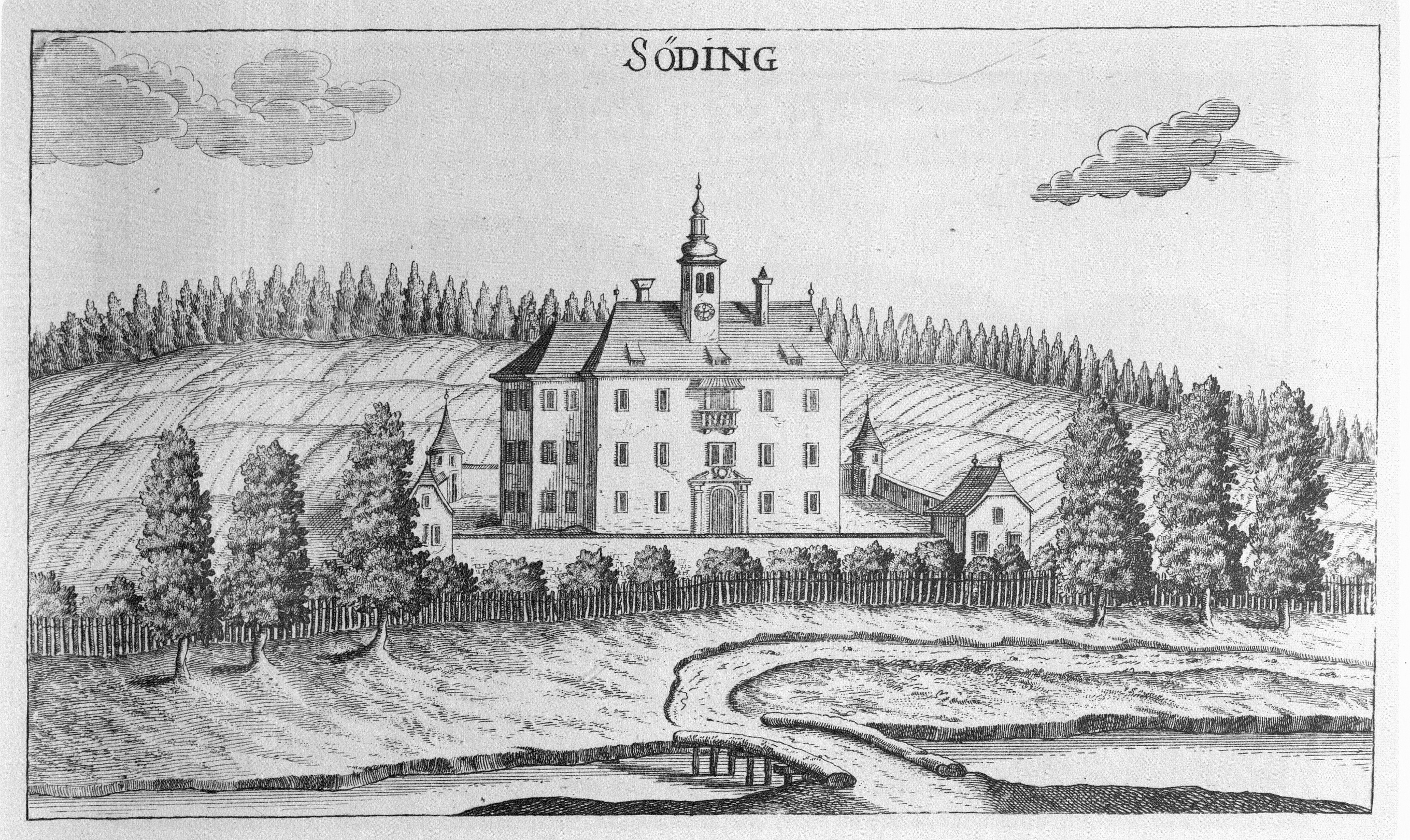 G. M. Vischers Käyserlichen Geographi, Topographia Ducatus Stiriae, Das ist: Eigentliche Delineation / und Abbildung aller Städte / Schlösser / Marcktfleck / Lustgärten / Probsteyen / Stiffter / Clöster und Kirchen / so es sich im Herzogthumb Steyrmarck befinden; Und anjetzo Umb einen billichen Preyß zu finden seynd Bey Johann Bitsch Universitäts Buchhandlern / Auff dem Juden=Platz bey der guldenen Saulen. Graz 1681 Die Nummerierung der Dateien folgt der alphabetischen Reihung der Ortsnamen und entspricht nicht dem Vischer-Register